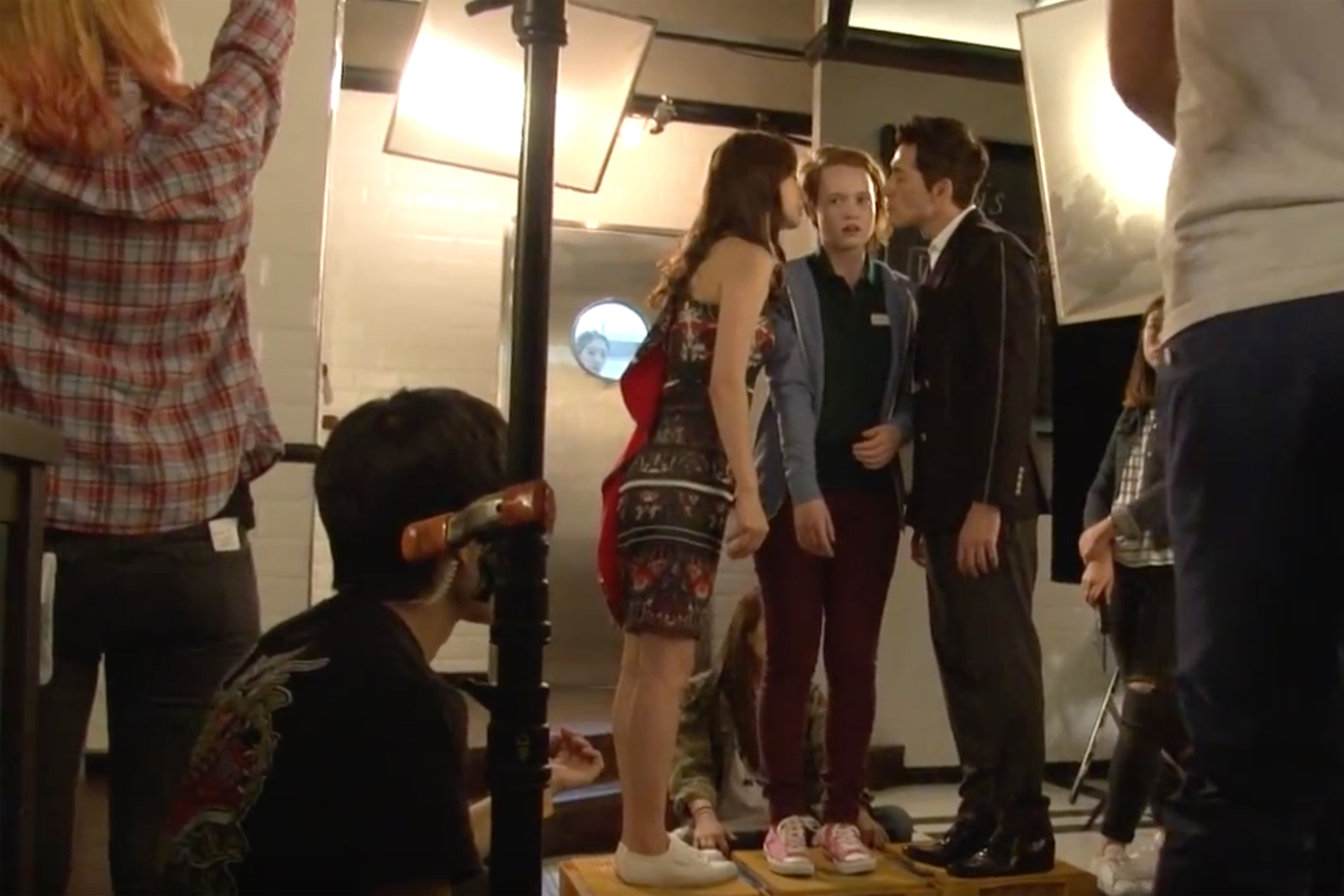 Viki